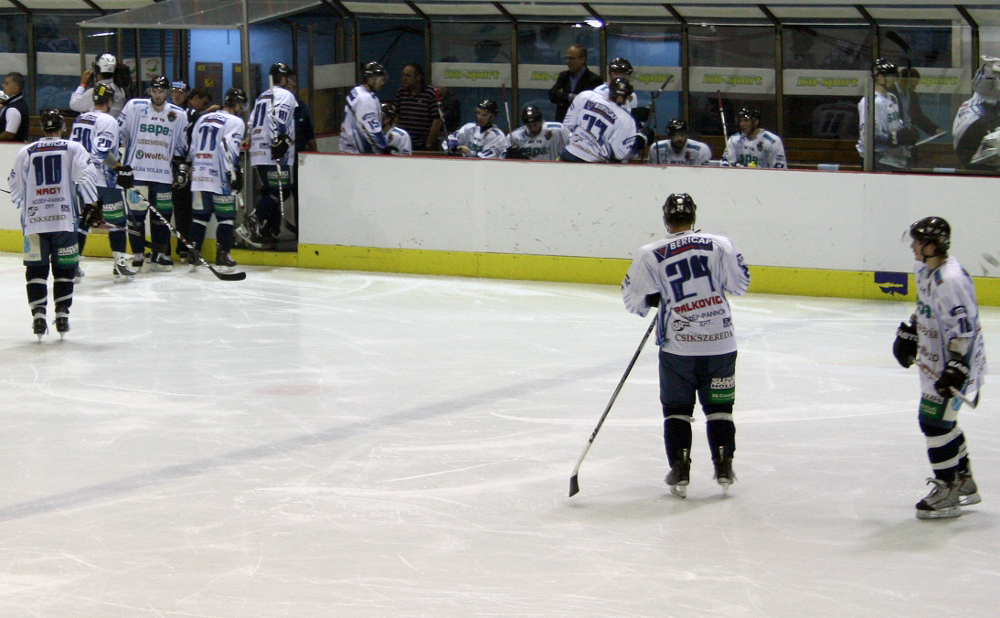 Hokej